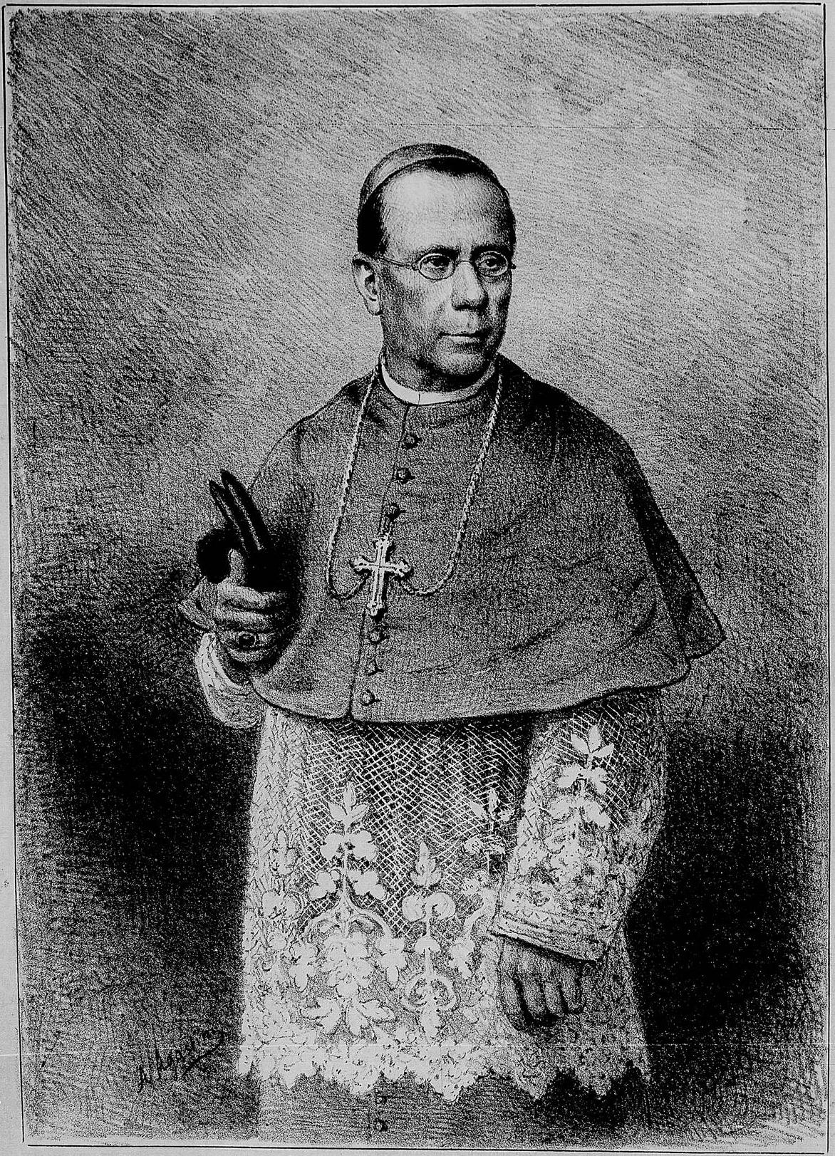 Dom João Esberard, Arcebispo do Rio de Janeiro